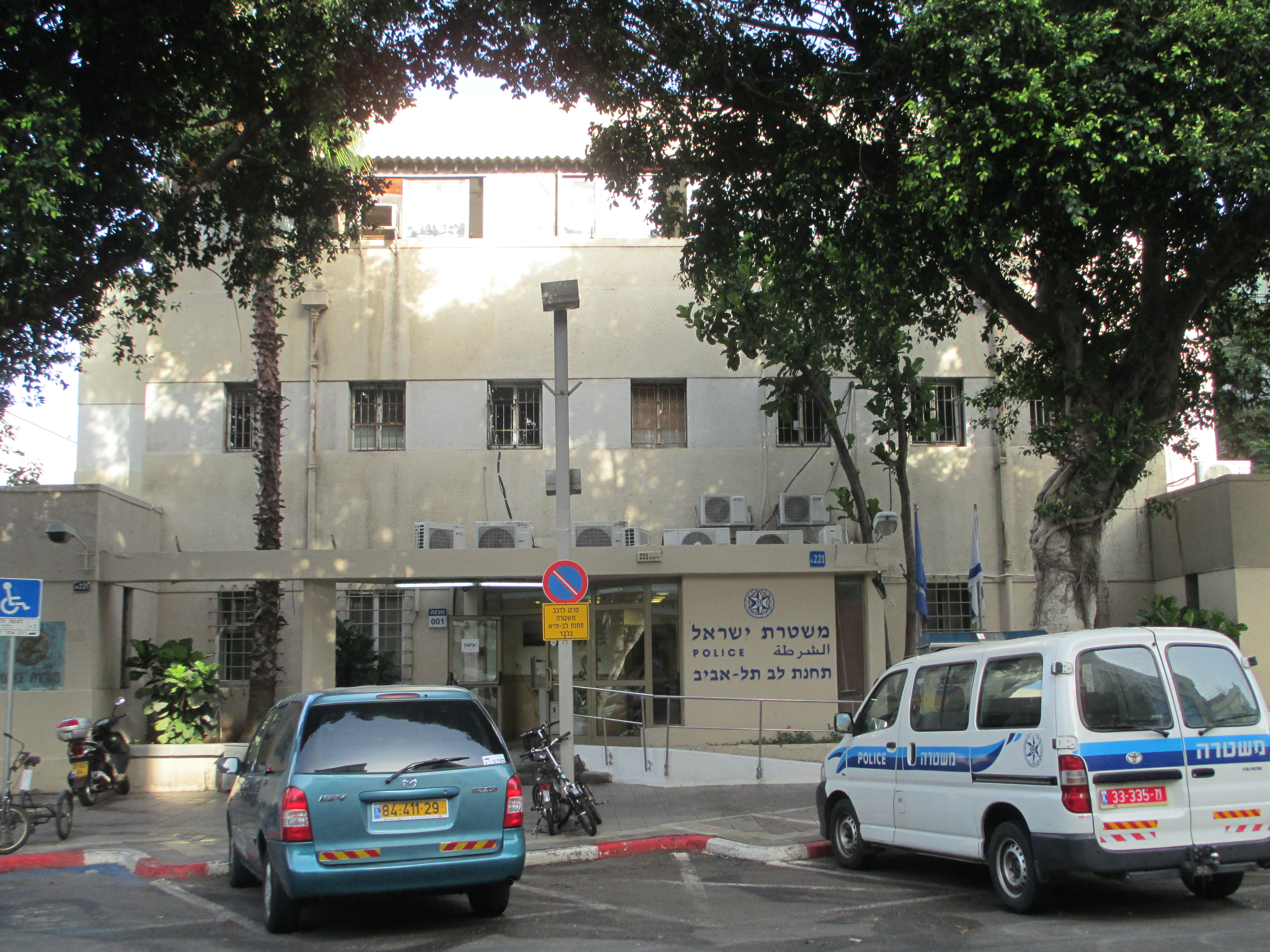 תחנת משטרת לב תל אביב ברח' דיזנגוף 221